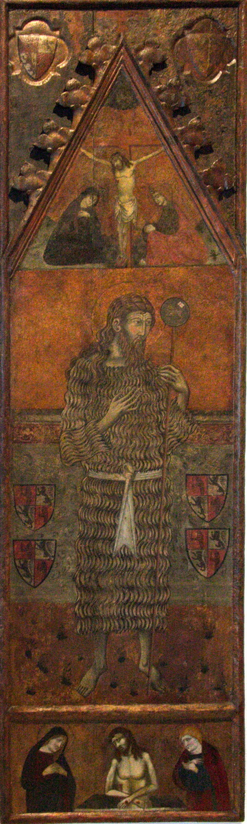 Taula de "Sant Joan Baptista" de l'església de Nostra Senyora de Tobed (Saragossa), obra de Francesc Serra (1359). Conservada al Museu de Maricel de Sitges